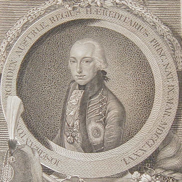 Czetter Sámuel, Tzetter, Zetter: Josef Anton Archidux.